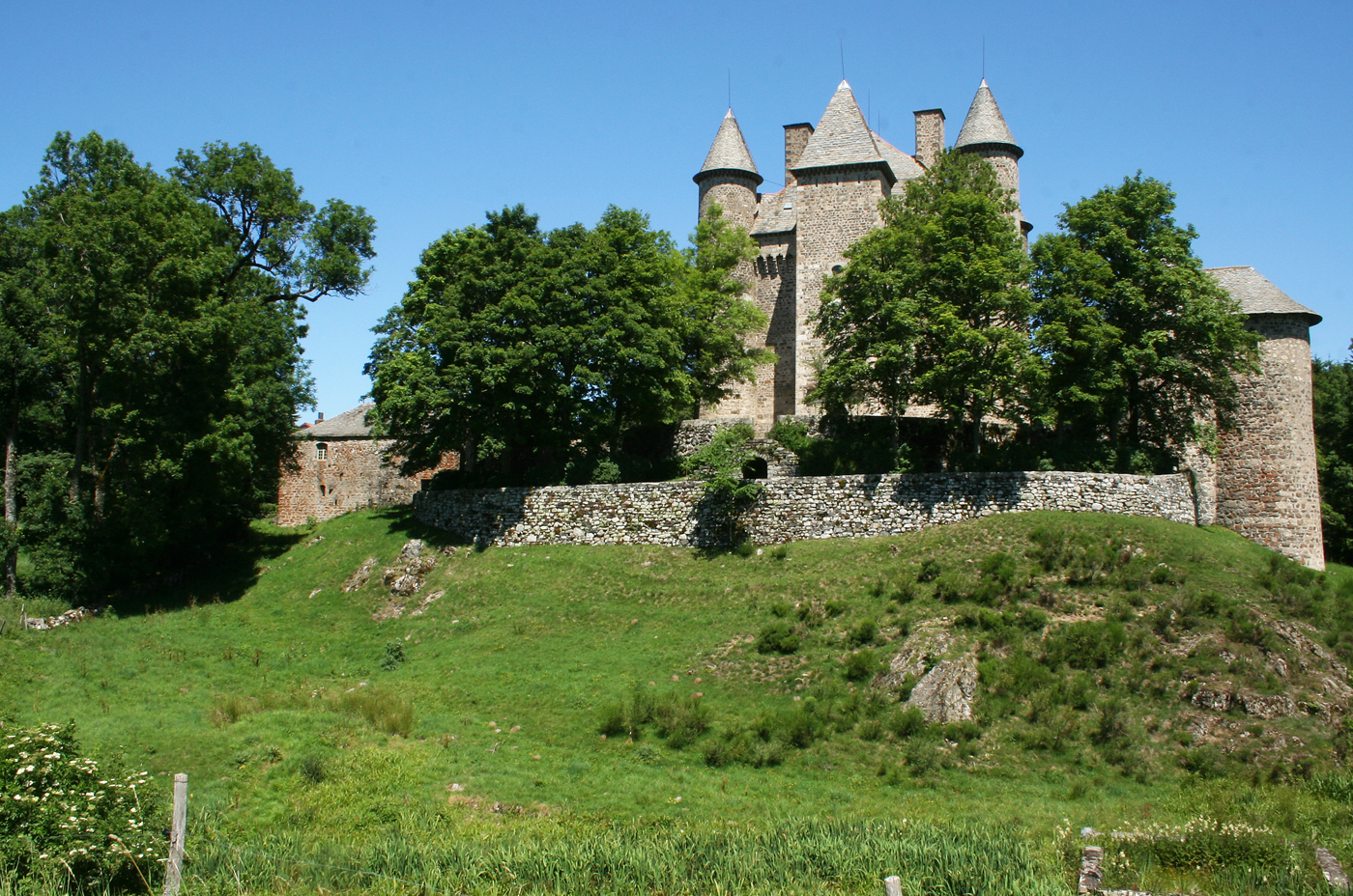 Vue d'ensemble du château de Vachères sur la commune de Présailles en Haute-Loire. .